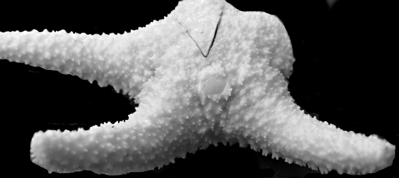 L'étoile de mer Bathyporania ascendens.